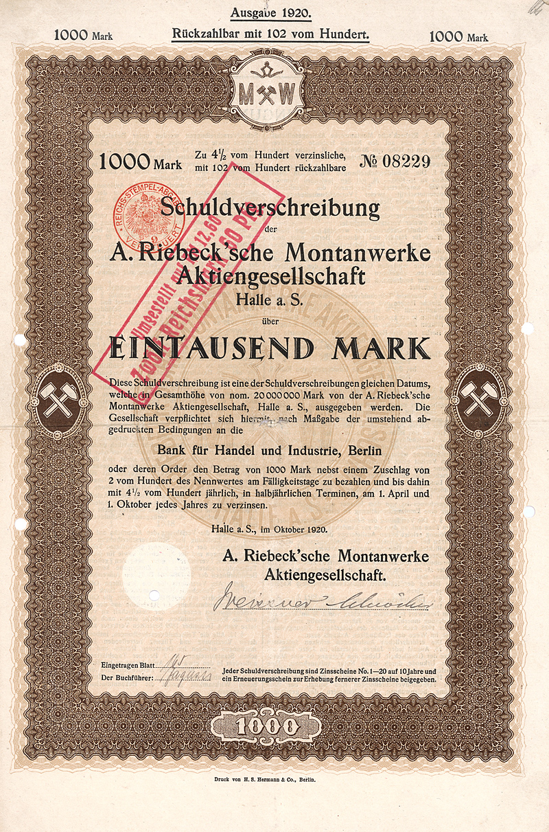 Schuldverschreibung über 1000 Mark der A. Riebeck'schen Montanwerke AG vom Oktober 1920